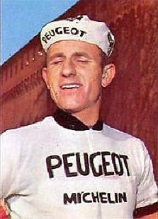 Jean-Pierre Danguillaume en 1970 - Campioni dello Sport 1970-1971, n°96